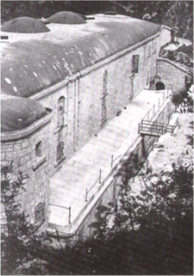 Batterieblock Forte Casa Ratti